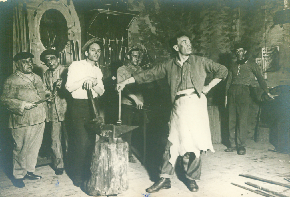 Foto di scena di mia proprietà con Viviani nel 1930 in " Il Mastro di Forgia"